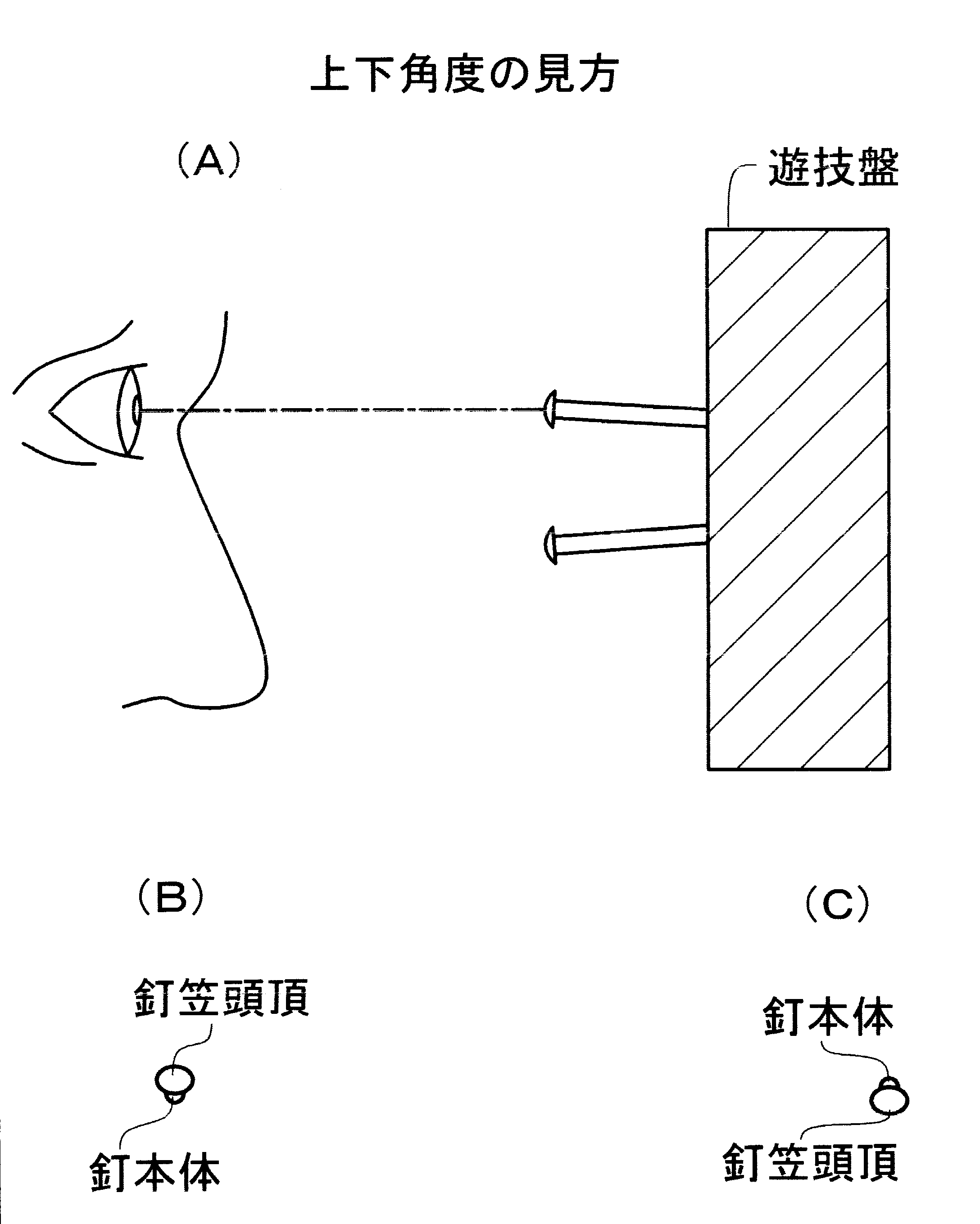 板ゲージの概観